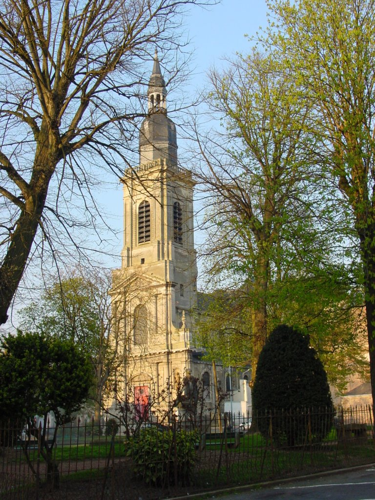 L'église Saint-Géry vue depuis la Place Verte (Cambrai)